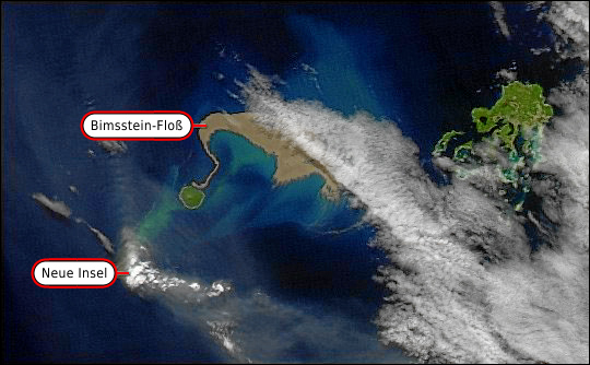 Bimsstein-Floß in der Nähe von Tonga-Inseln, vom NASA Earth Observatory aufgenommen, basierend auf Daten des MODIS Rapid Response System, Goddard Space Flight Center.